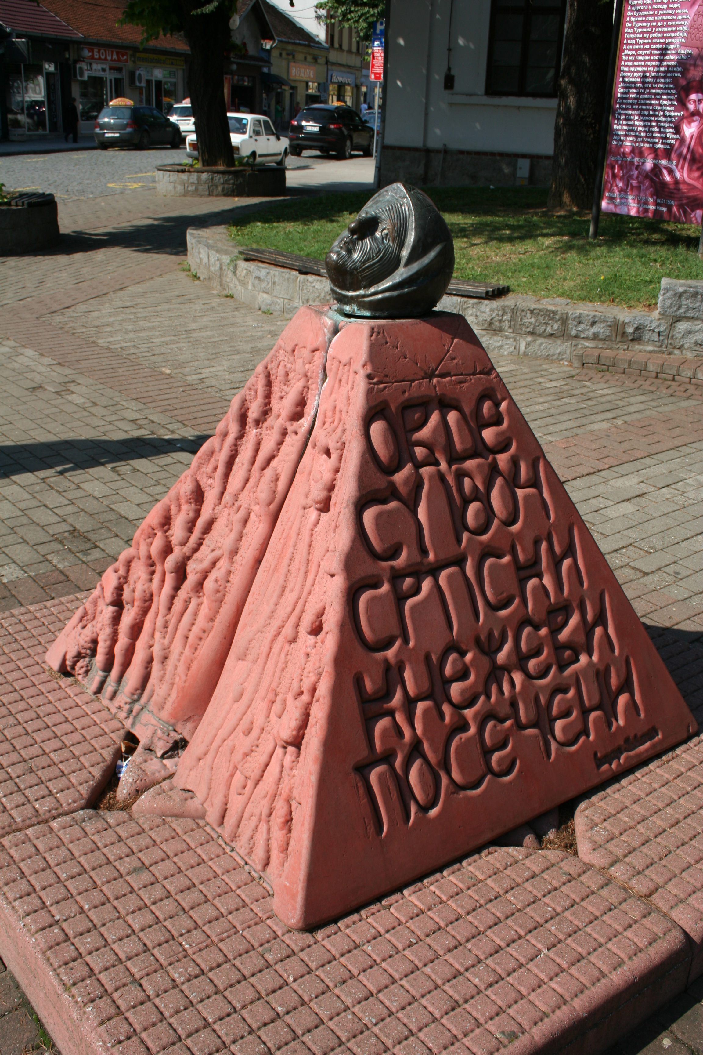 Spomenici Valjevo